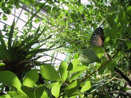 足立区生物園温室